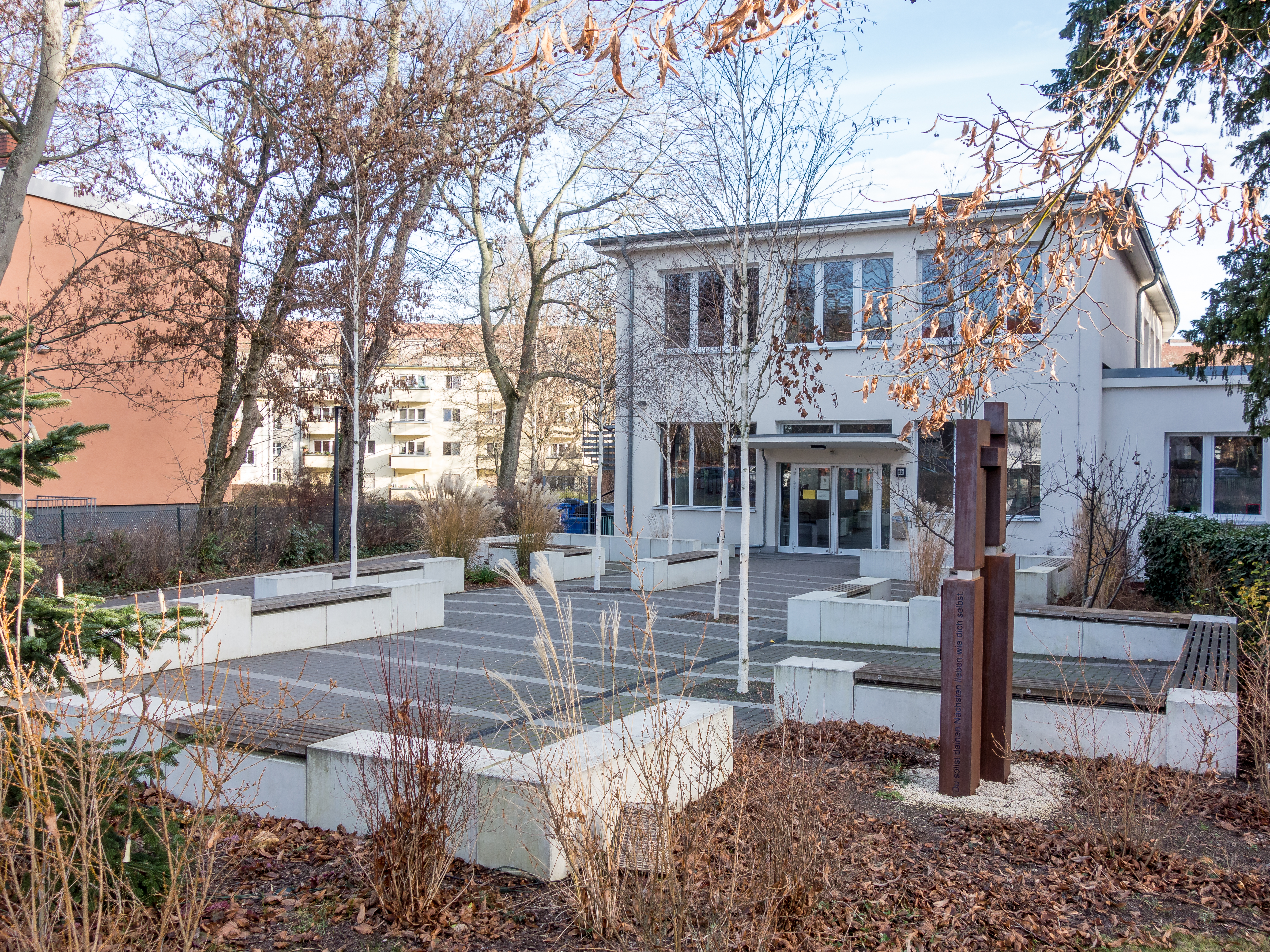 Eingangsbereich der Katholische Schule Liebfrauen in Berlin, Fotograf: O. Kramzik